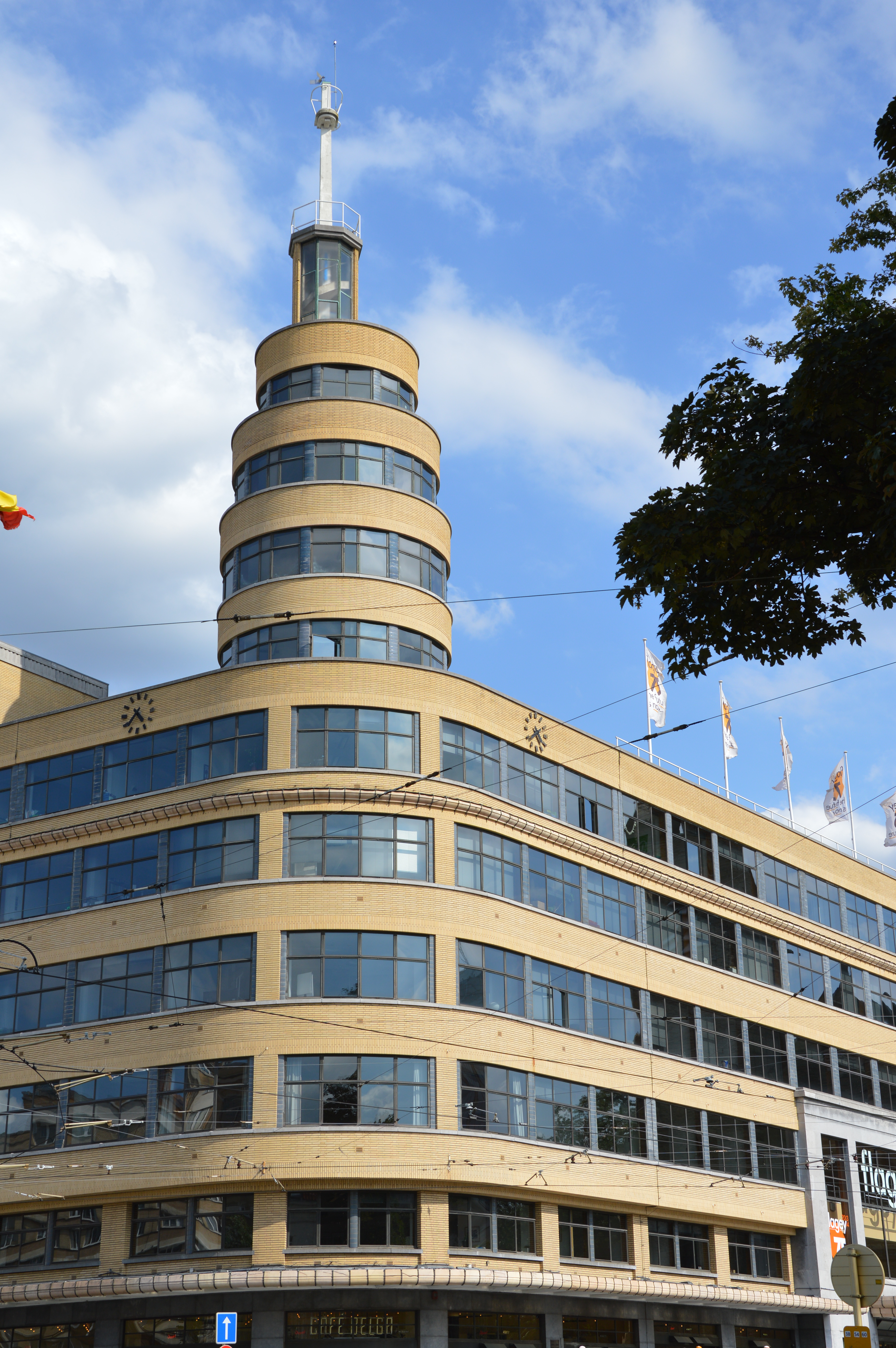 Place Eugène Flagey, 18 à Ixelles.